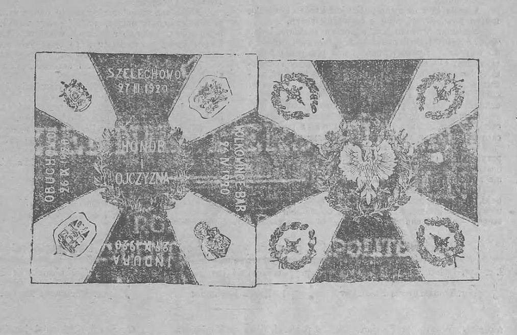 Sztandar 4 Pułku Strzelców Podhalańskich (1924)